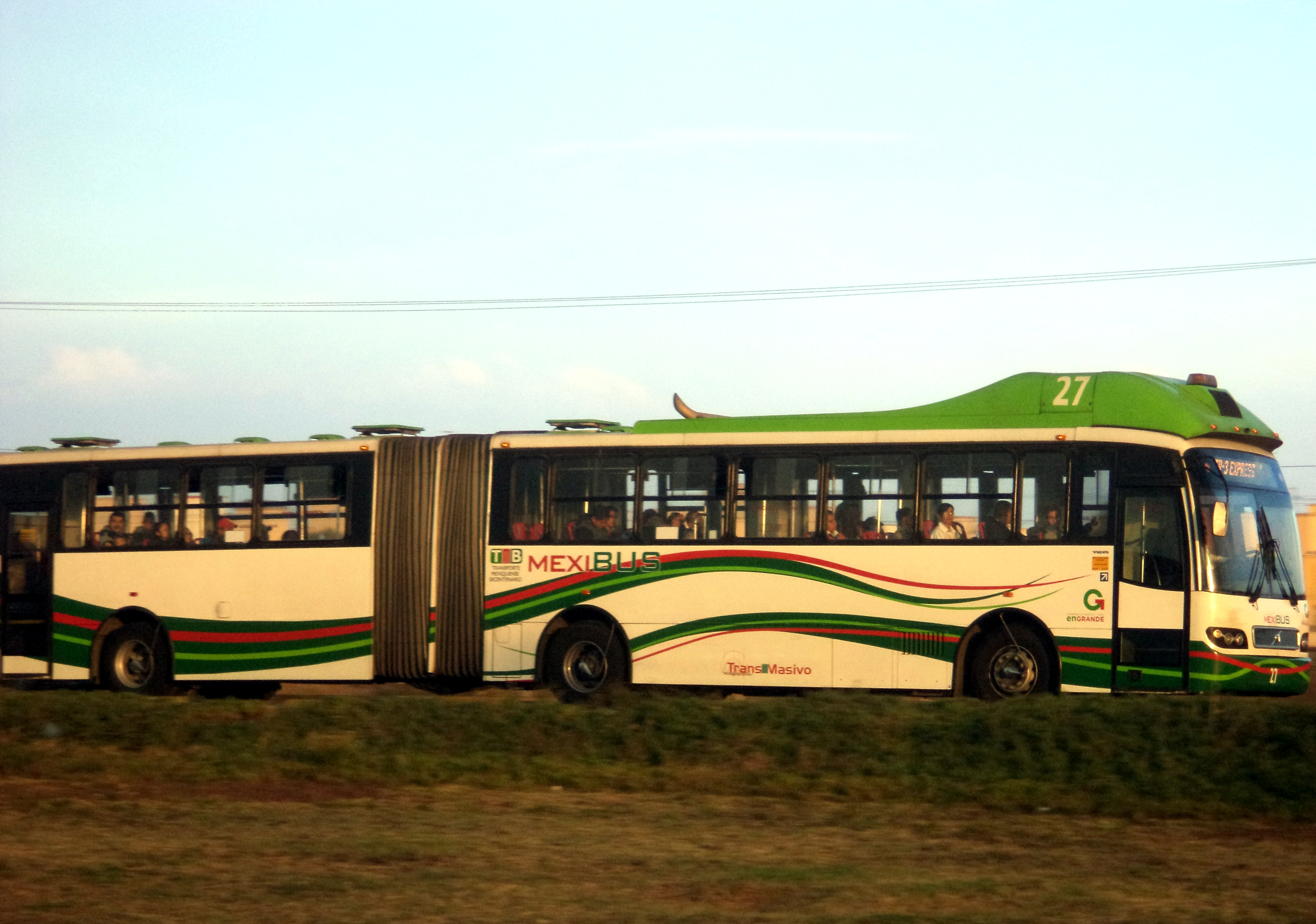 Autobus articulado del Mexibus línea 1